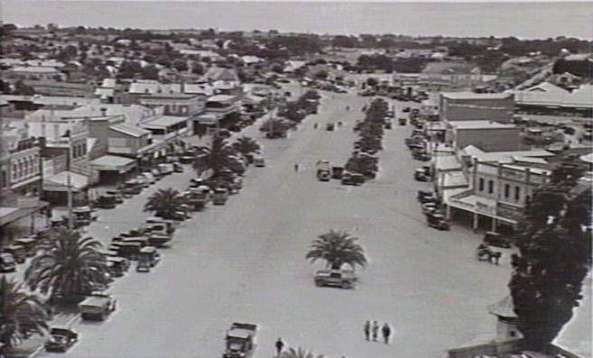 Lonsdale Street, Dandenong in 1938